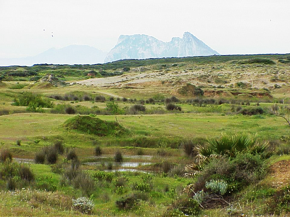 Arenales de Guadalquitón, con Gibraltar y África al fondo